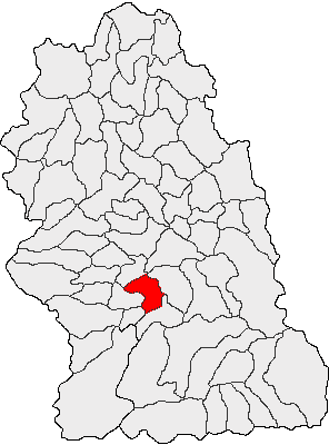 Categorie:Hărţi ale judeţului Hunedoara